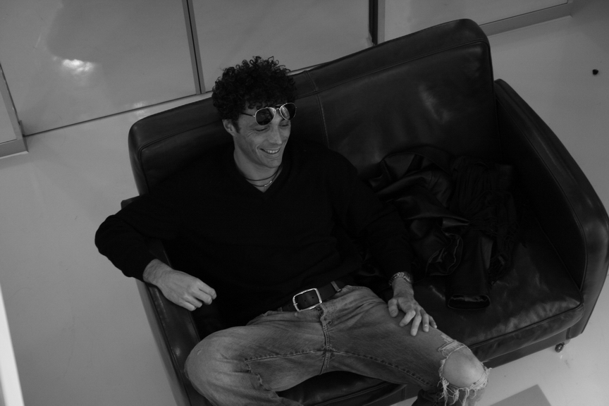 Alex Britti durante una pausa sul set del videoclip del singolo "Quanto ti amo"